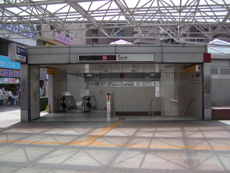 大阪市営地下鉄御堂筋線 中百舌鳥駅 8号出口